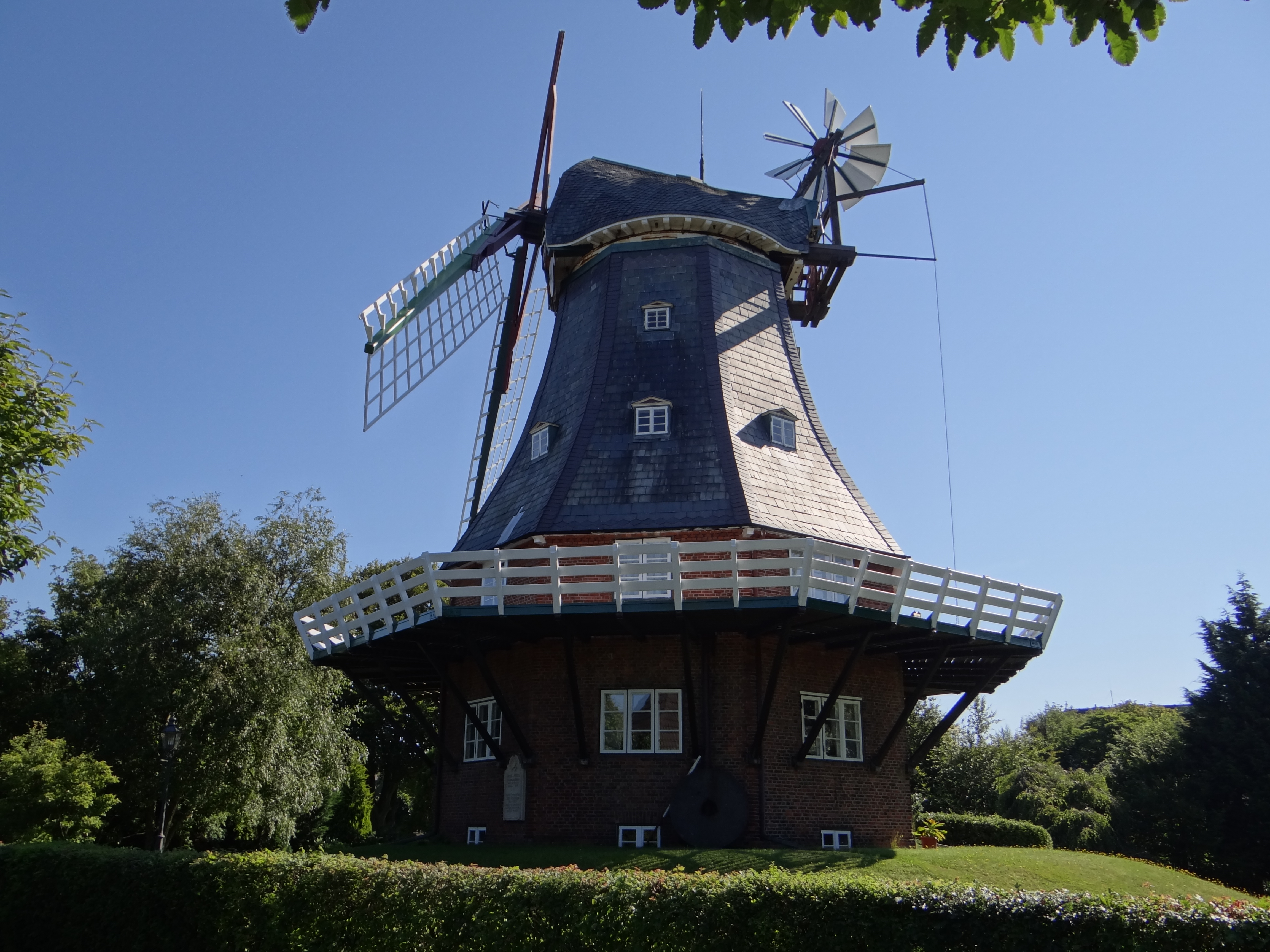 Windmühle "Venti Amica" in Wyk auf Föhr